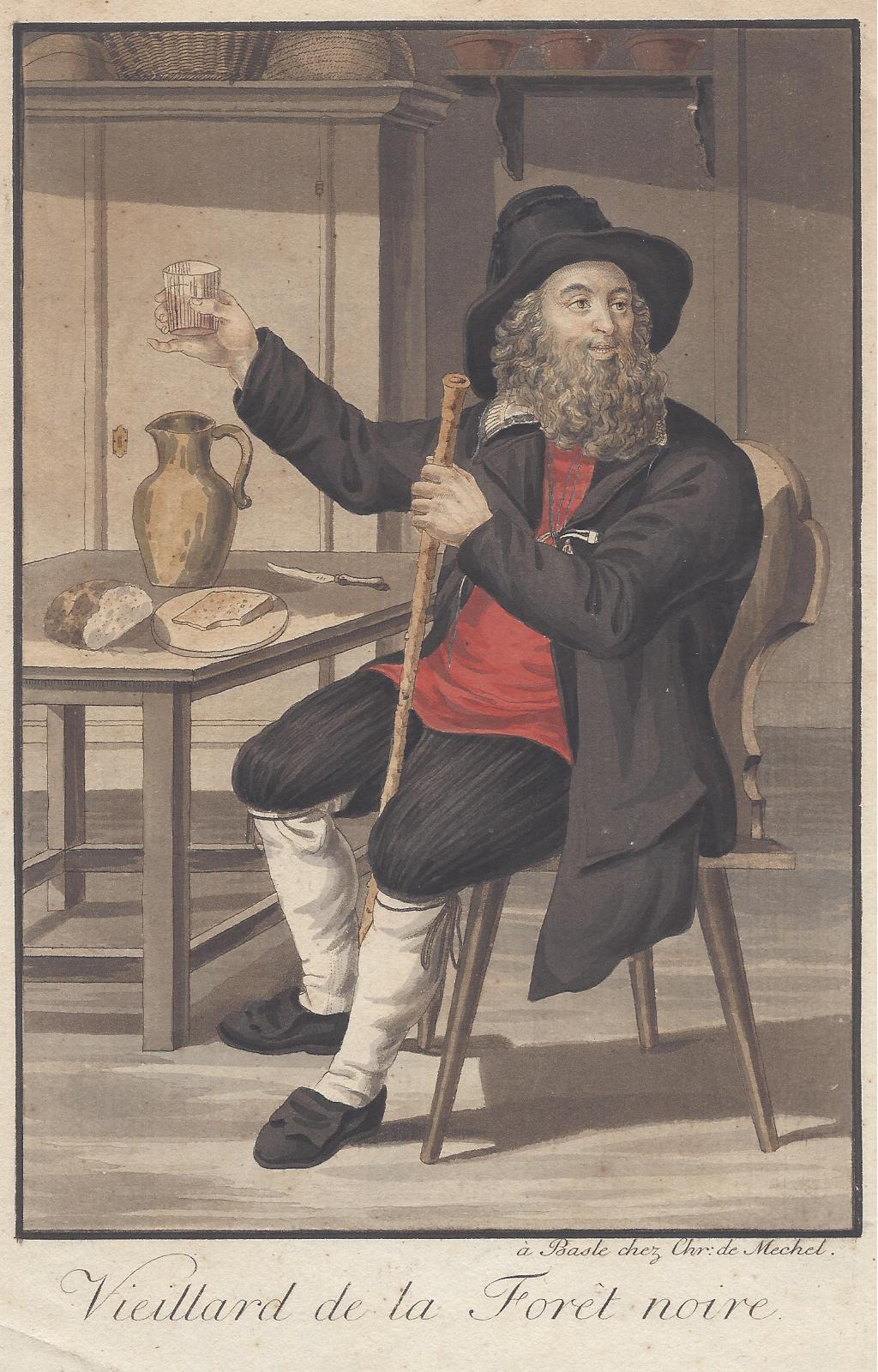 Der Dogerner Hirschenwirt Konrad Ebner in der Altherrentracht bei der Brotzeit. Mir Deckfarben kolorierter Kupferstich im Verlag Christian von Mechels nach einer 1783 gefertigten Zeichnung Samuel Graenichers. Erste Fassung mit Mostkrug.